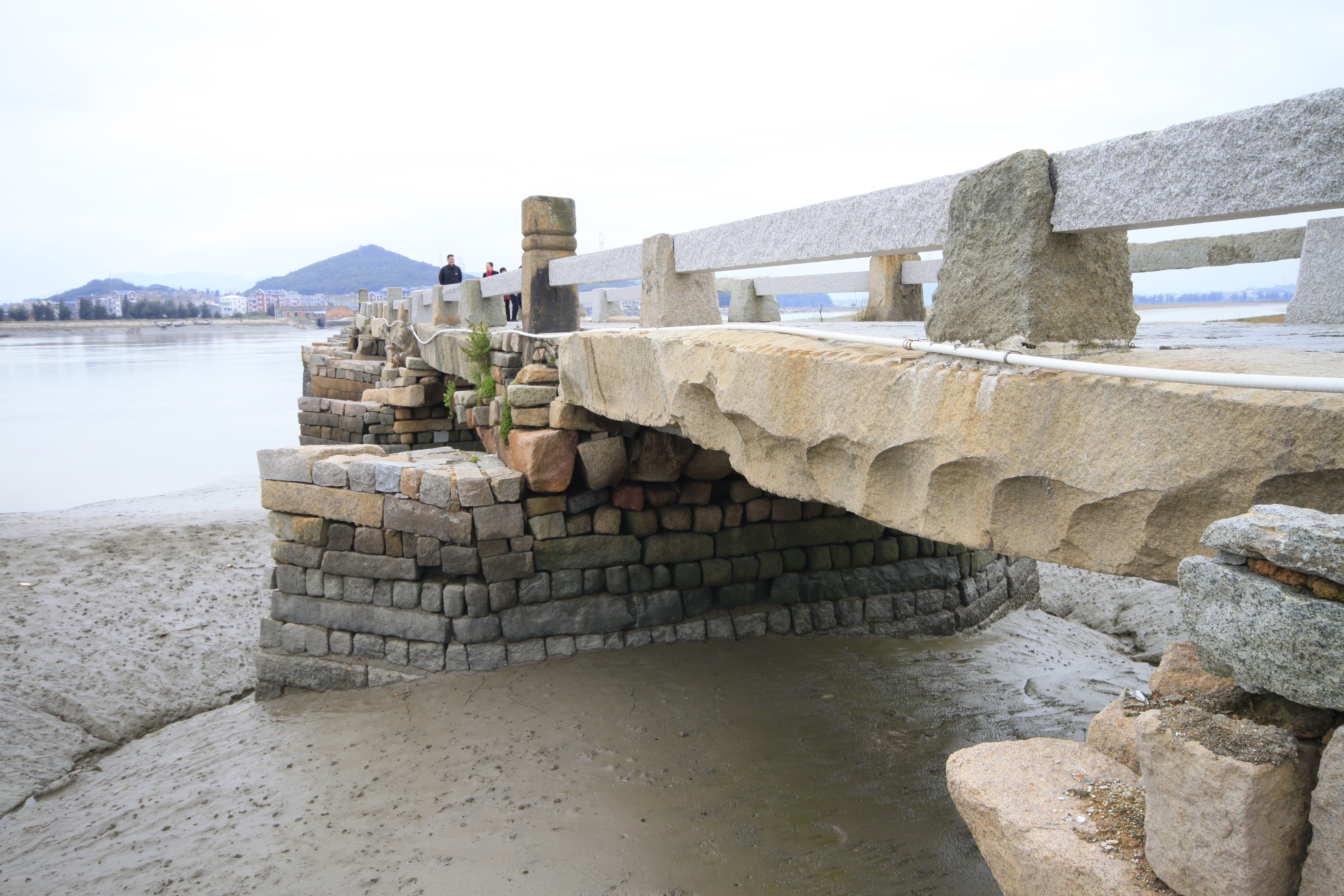 龙江桥，位于中国福建省福清市，是福建省文物保护单位。